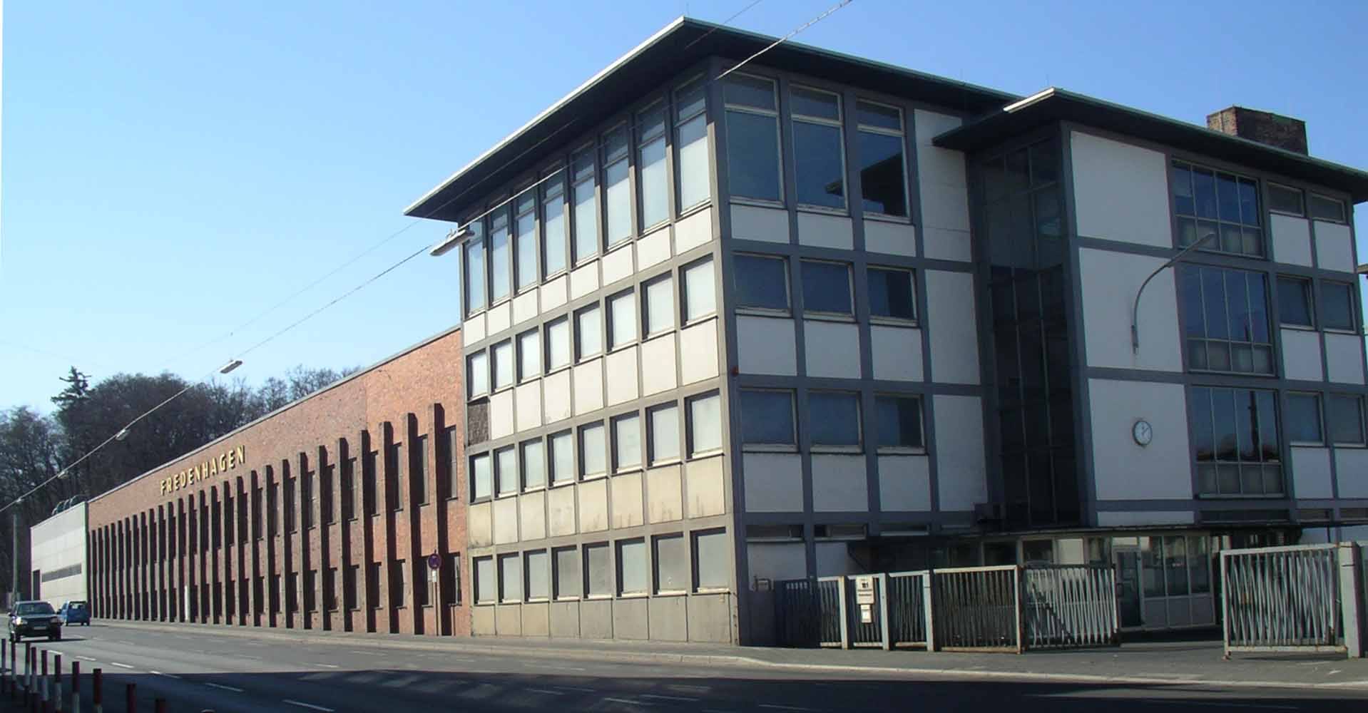 Ehemaliges Gelände der Fredenhagen GmbH & Co. KG in der Sprendlinger Straße in Offenbach